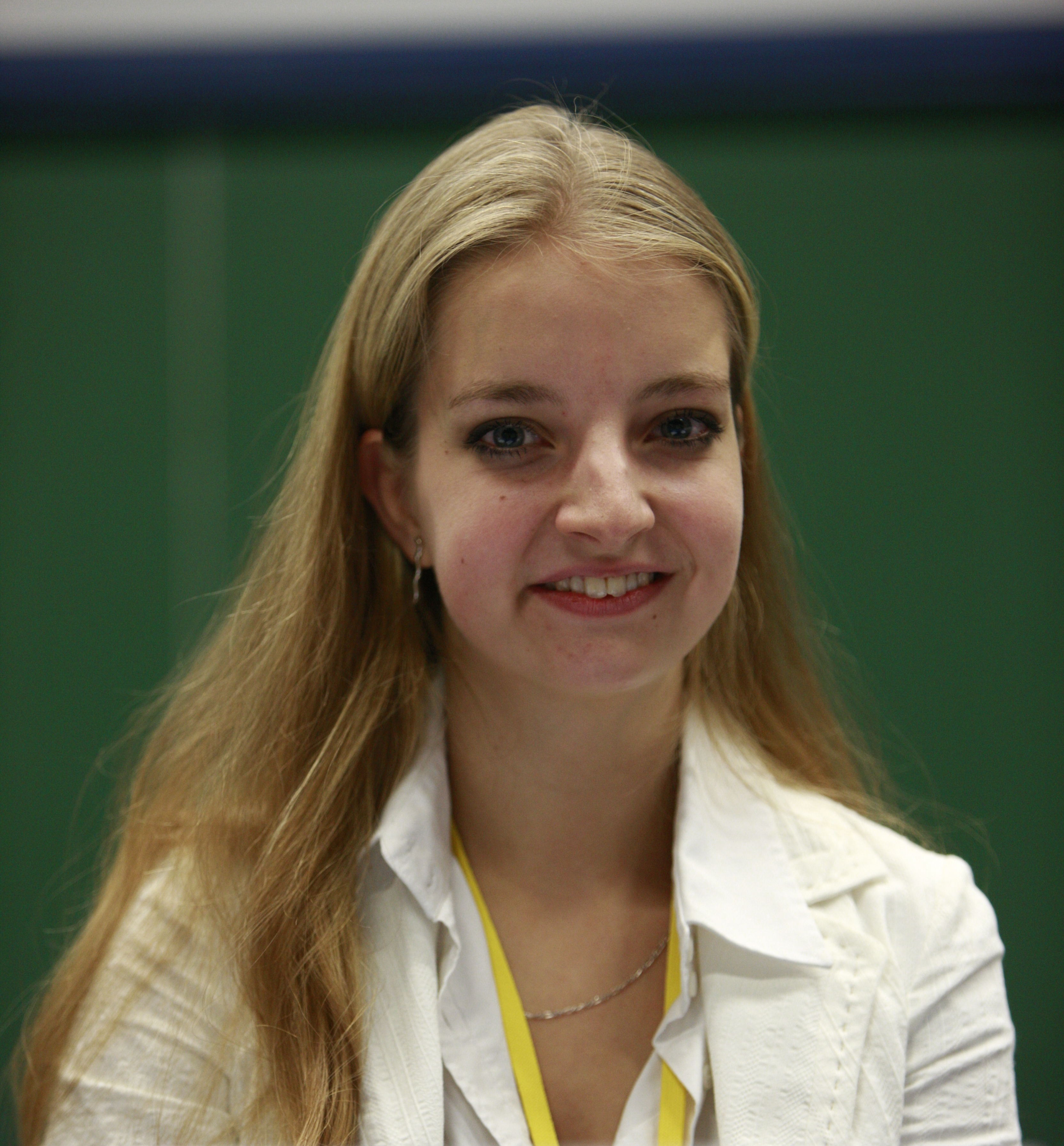 Lise de la Salle, pianiste française